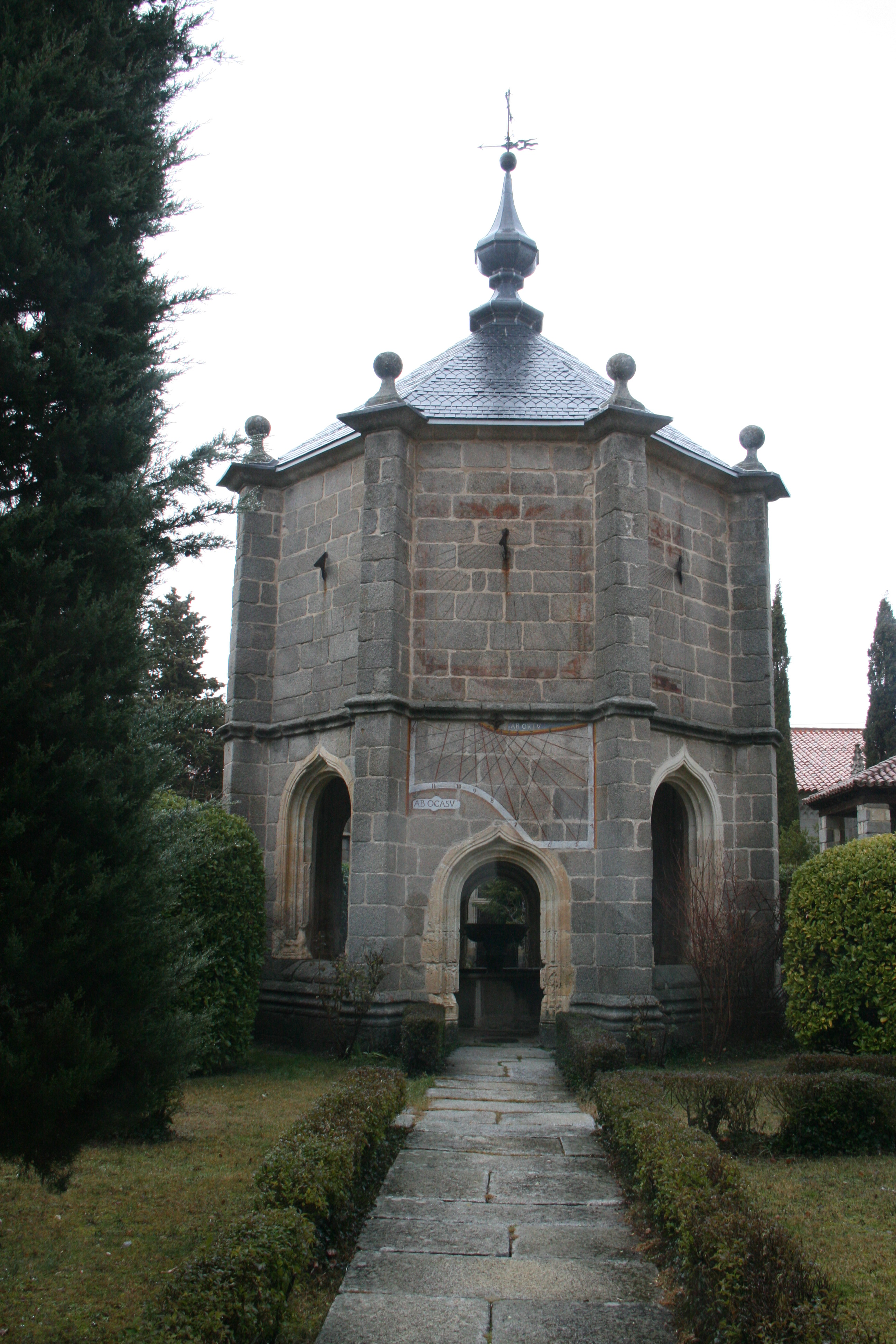 Torre del agua - Monasterio del Paular